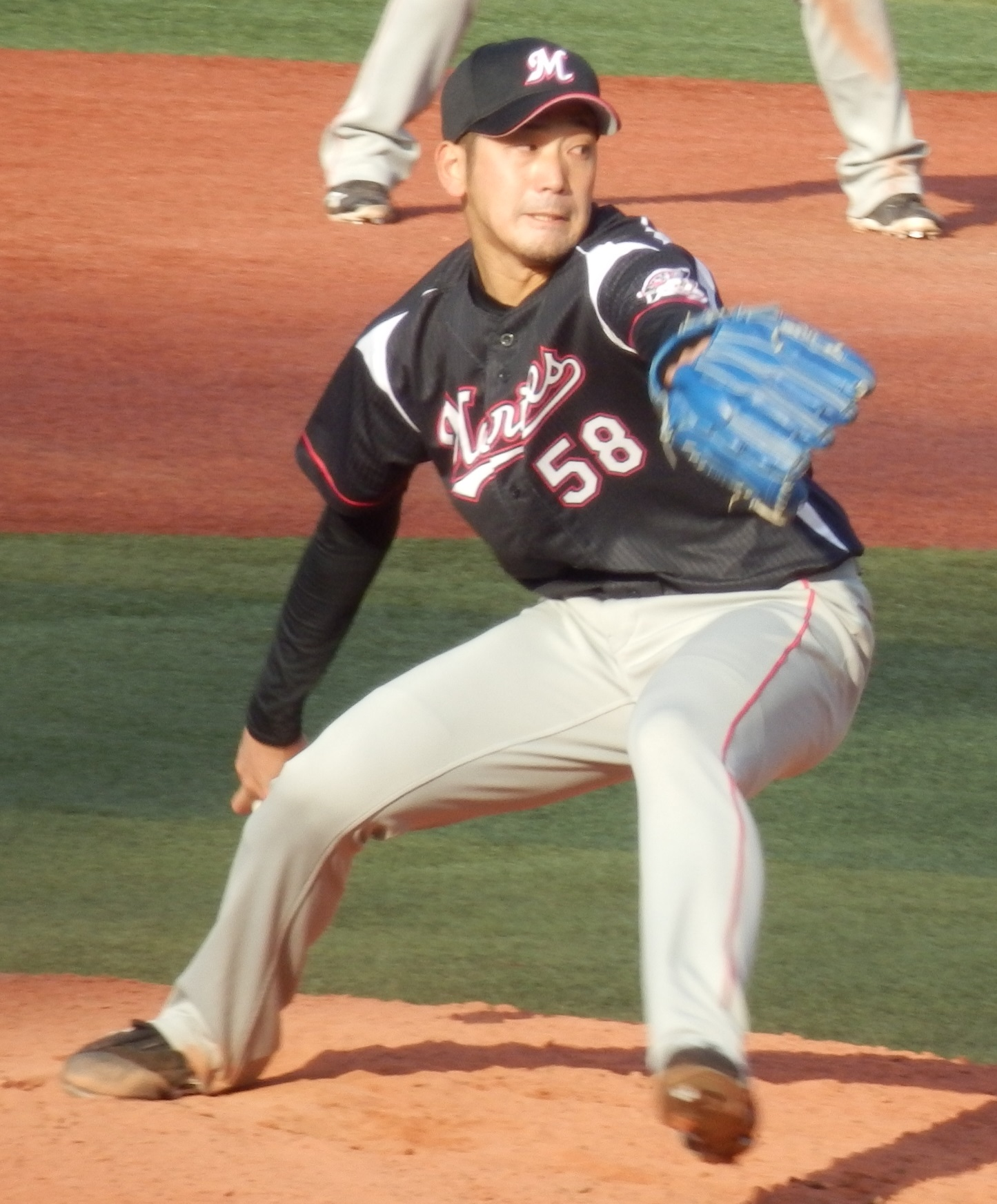 2017/03/12 横浜スタジアム